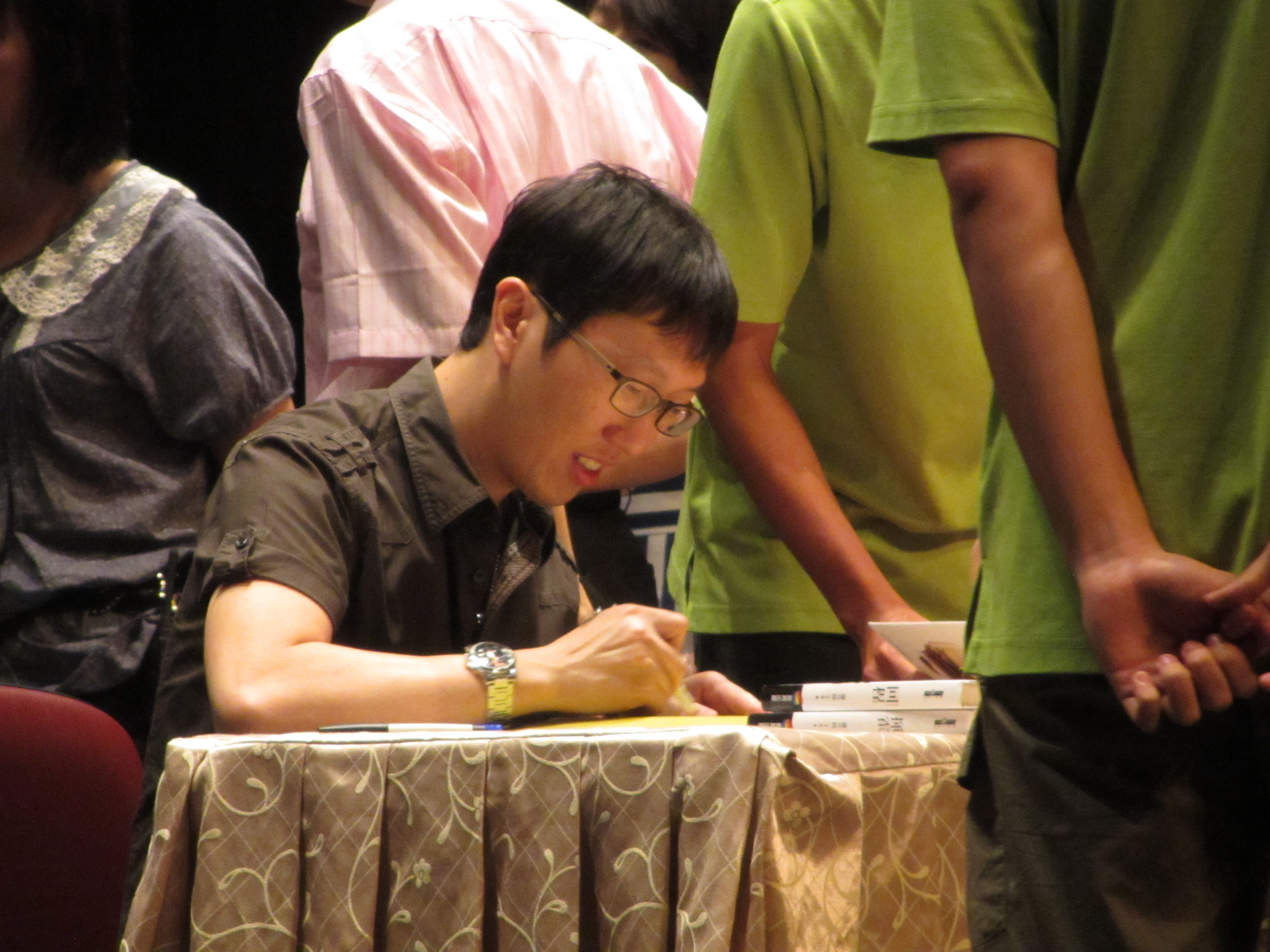 簽書中的作家藤井樹（吳子雲）